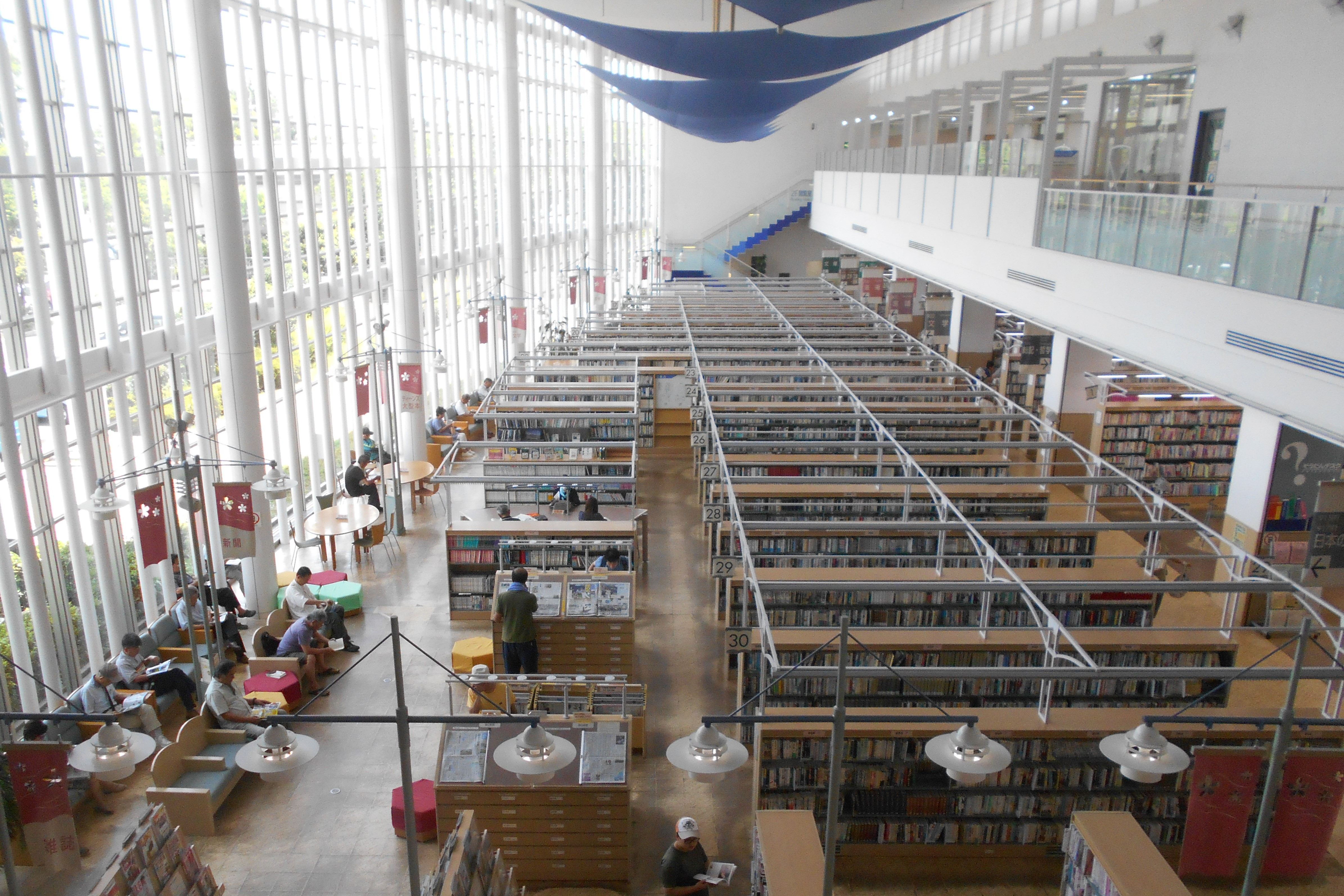 愛知県豊川市の豊川市中央図書館。